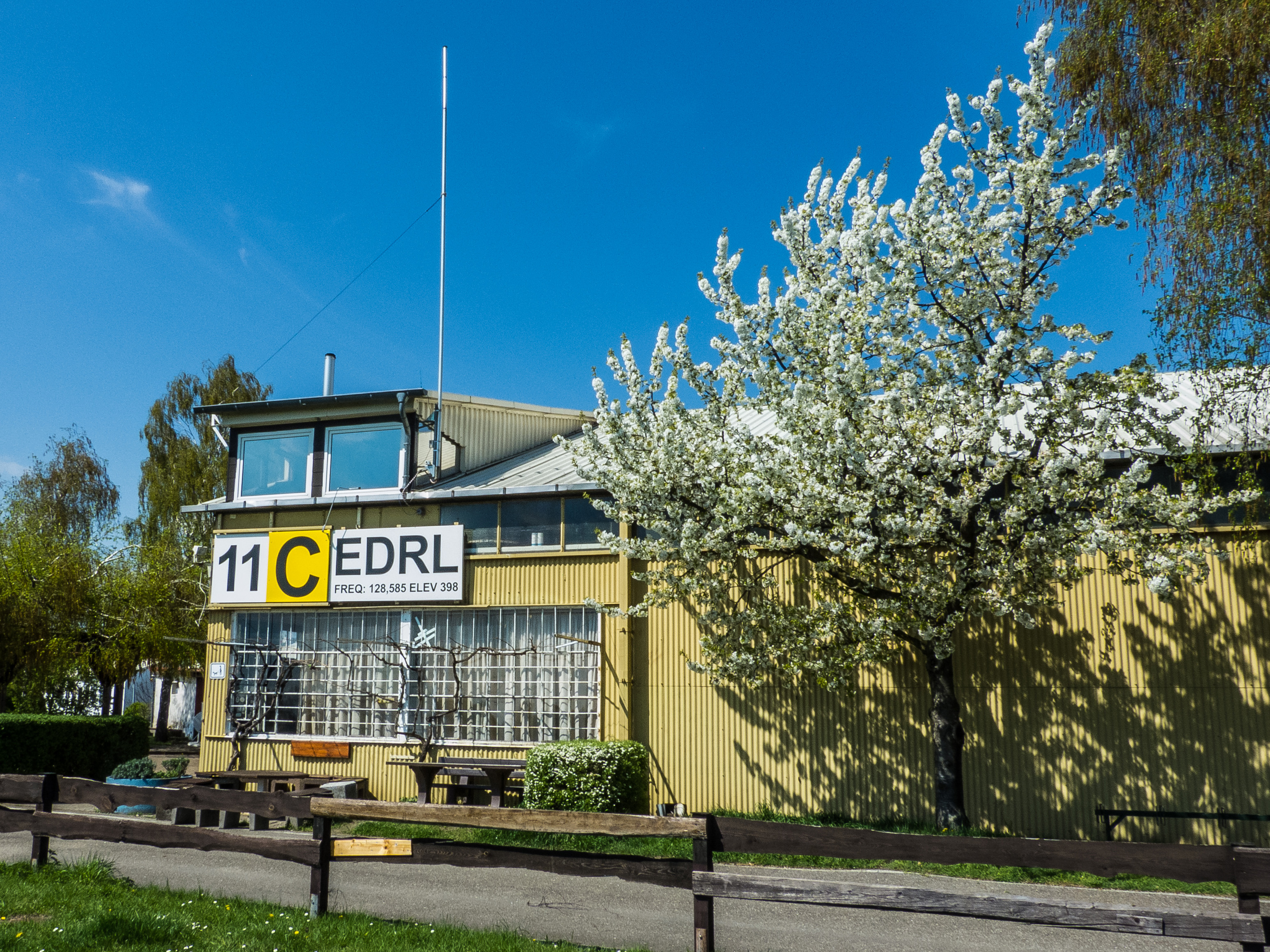 Kontrollturm (Tower) Flugplatz Lachen-Speyerdorf